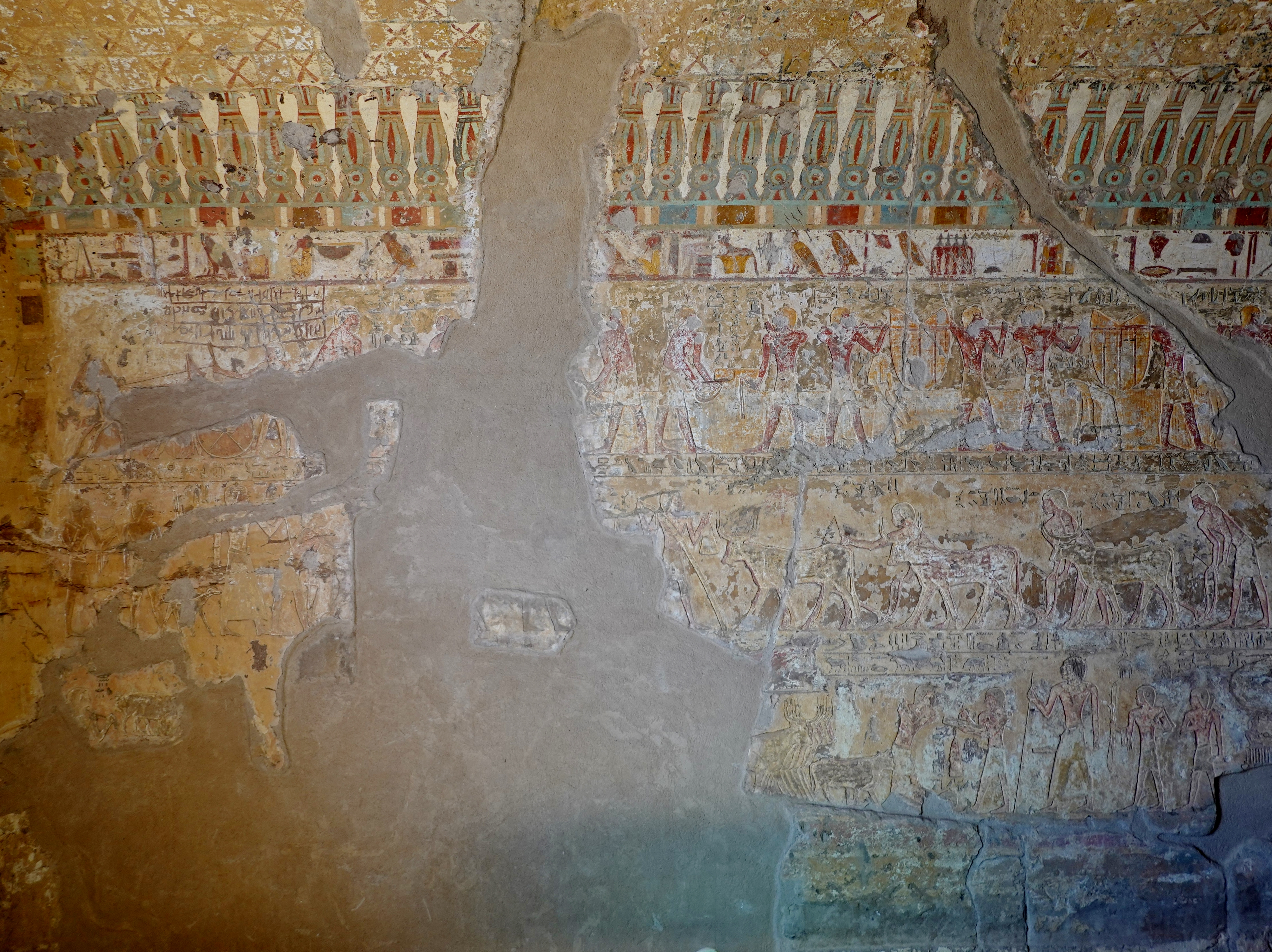 Felsengrab des Renni unter den Felsengräbern des altägyptischen Necheb bei el-Kab, Ägypten